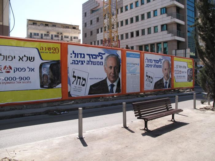 בשדרות רוטשילד תל אביב